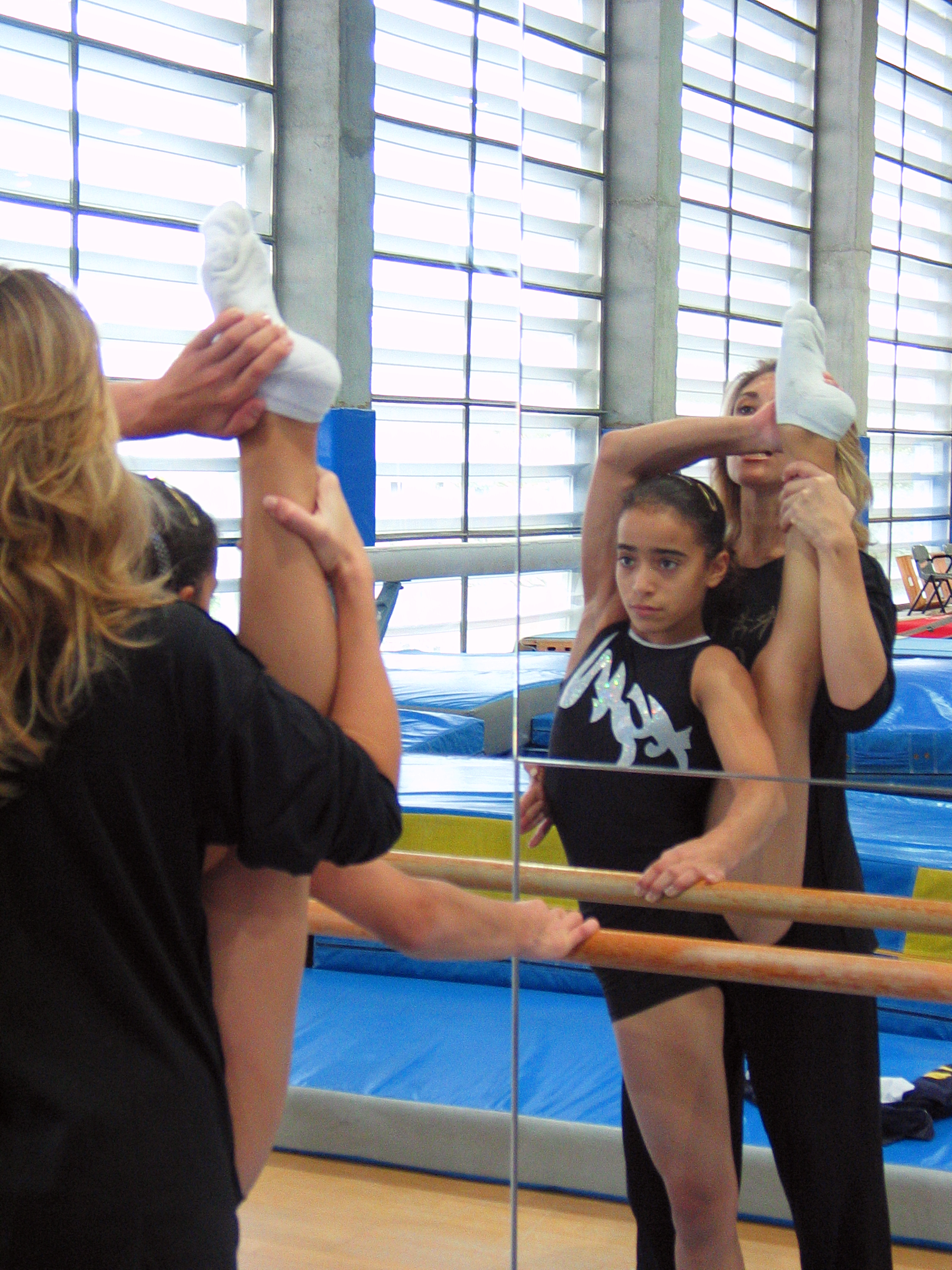 Tania Gener y la coreógrafa Fuensanta Ros en el CAR de Madrid el 20 de octubre de 2003.